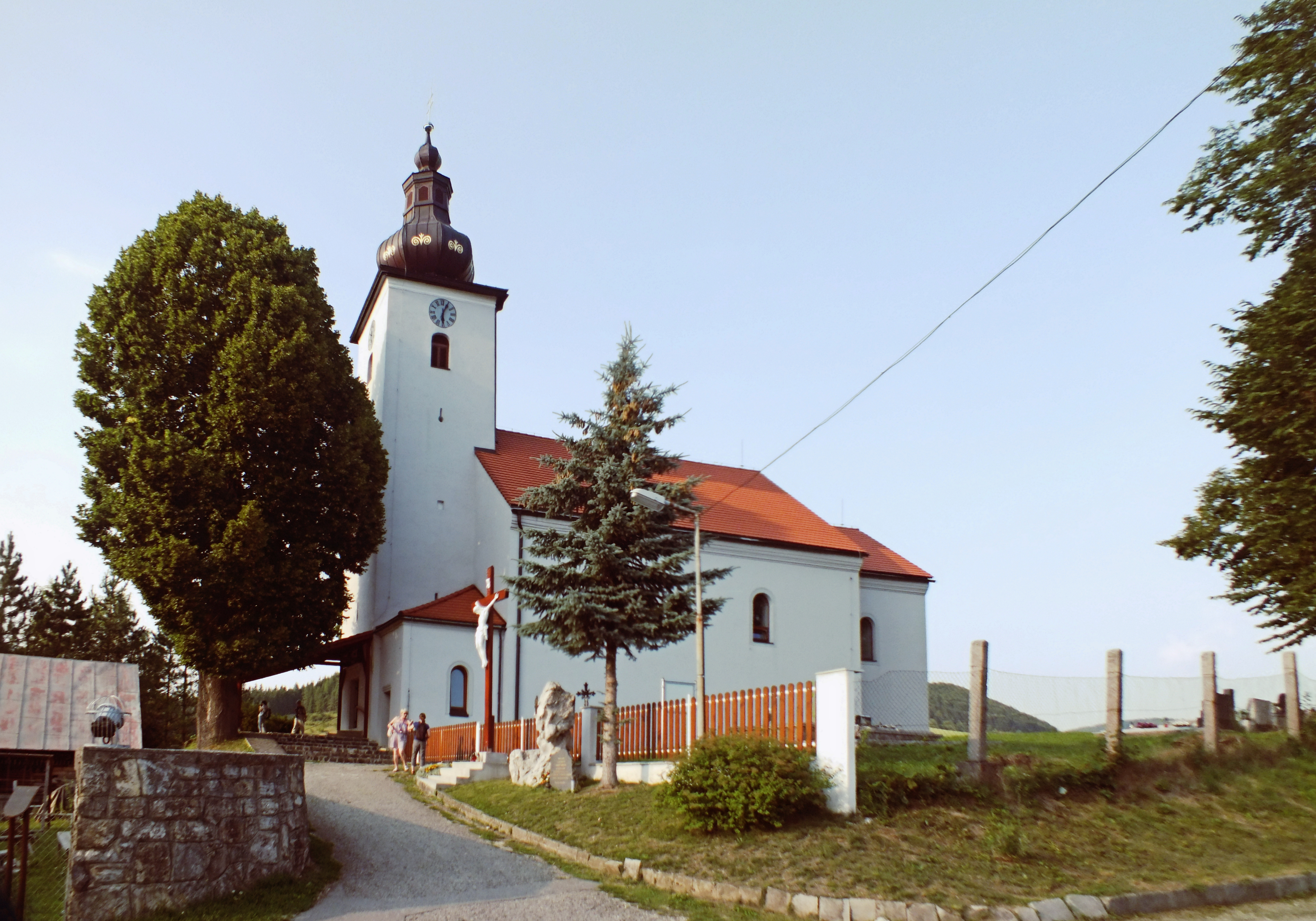 Kościół pw. Odnalezienia Krzyża Św. w Cziczmanach